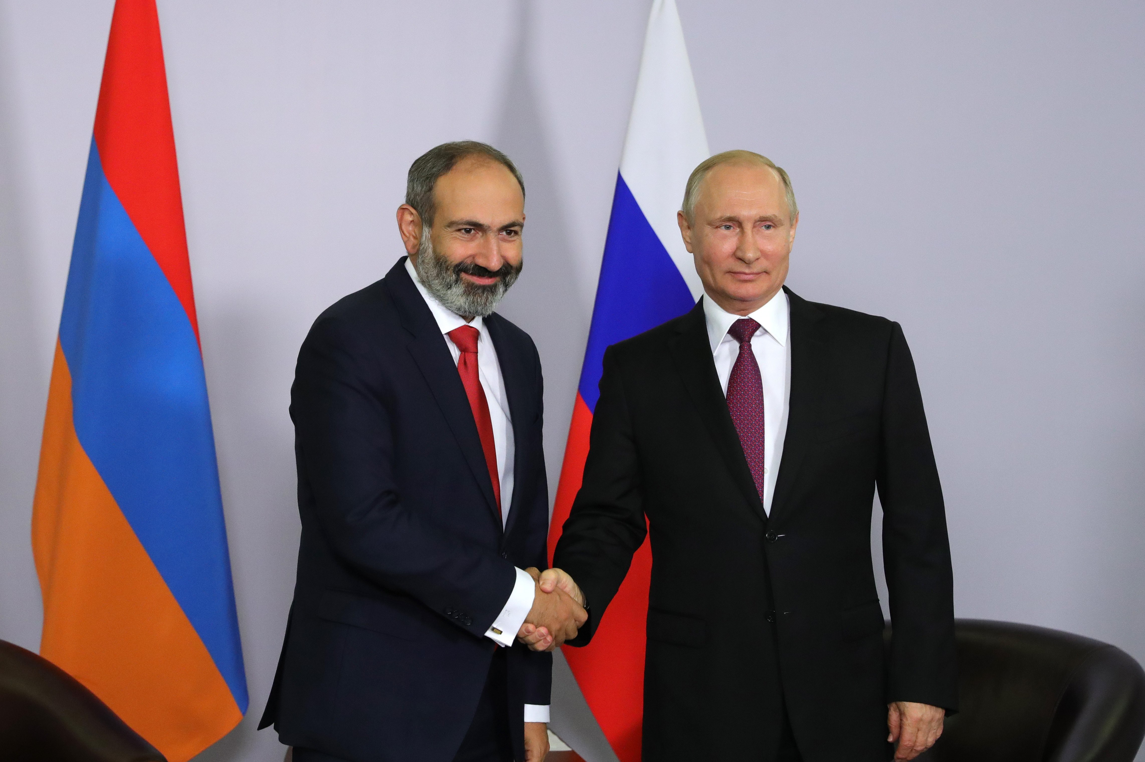 Встреча Президента России Владимира Путина с Премьер-министром Республики Армения Николом Пашиняном